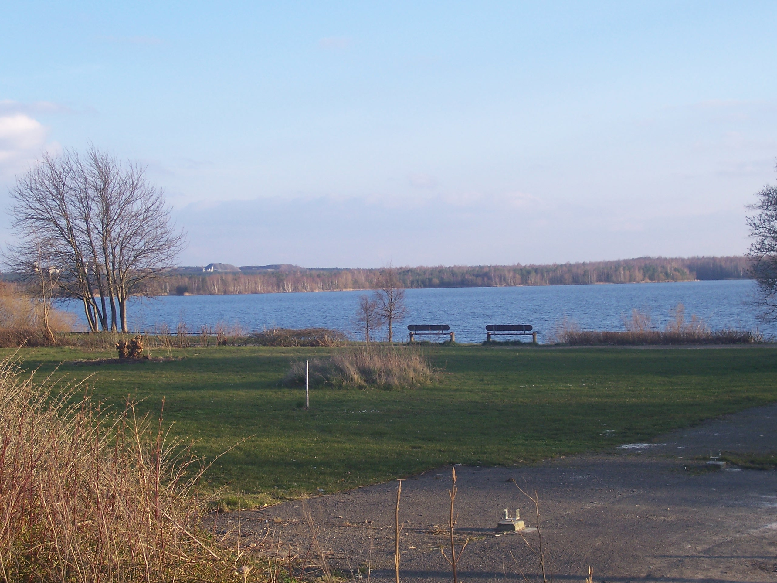 Senftenberger See, im Hintergrund der Koschenberg